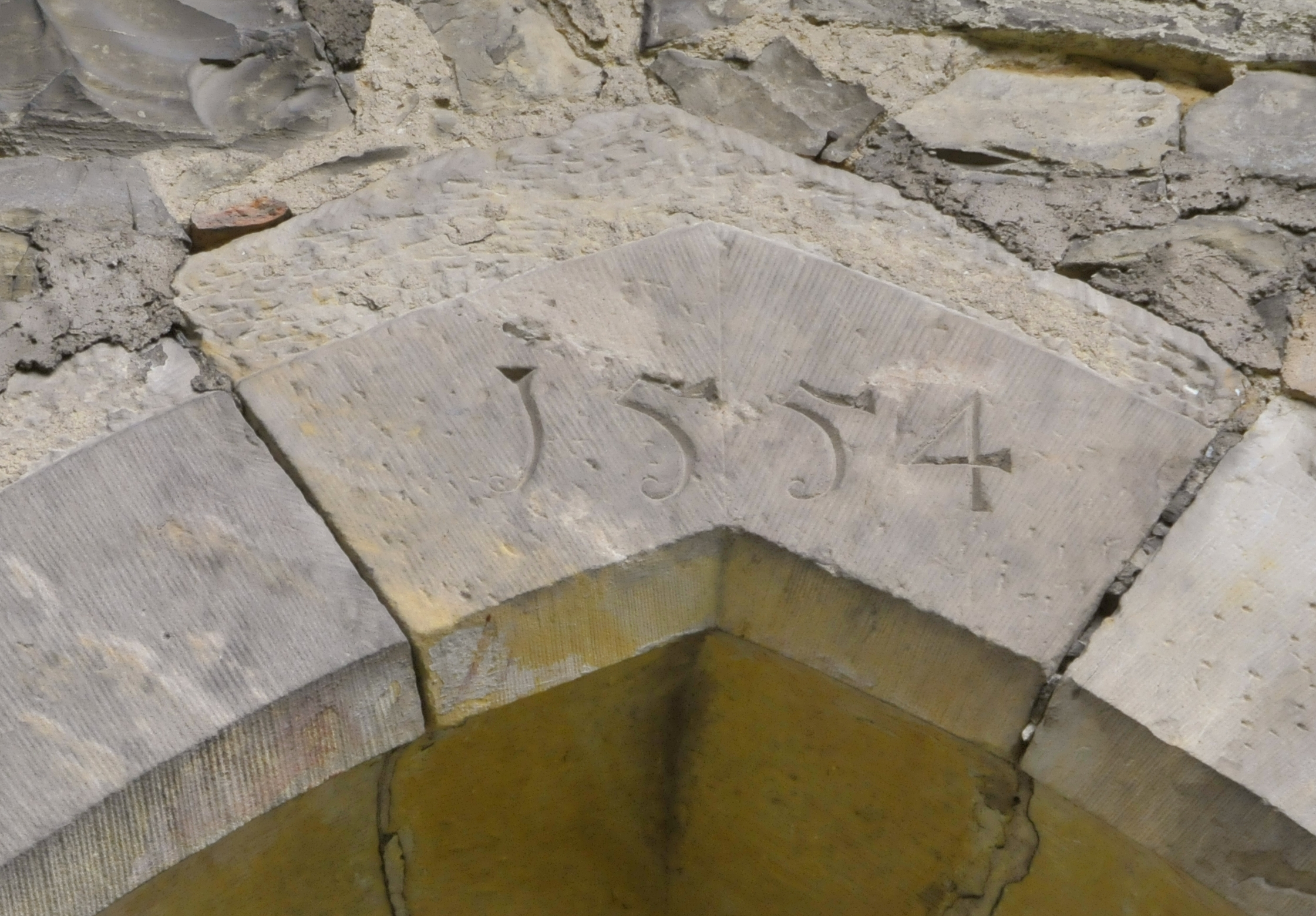 Warza, Kirche, Schlusstein mit Jahreszahl 1554